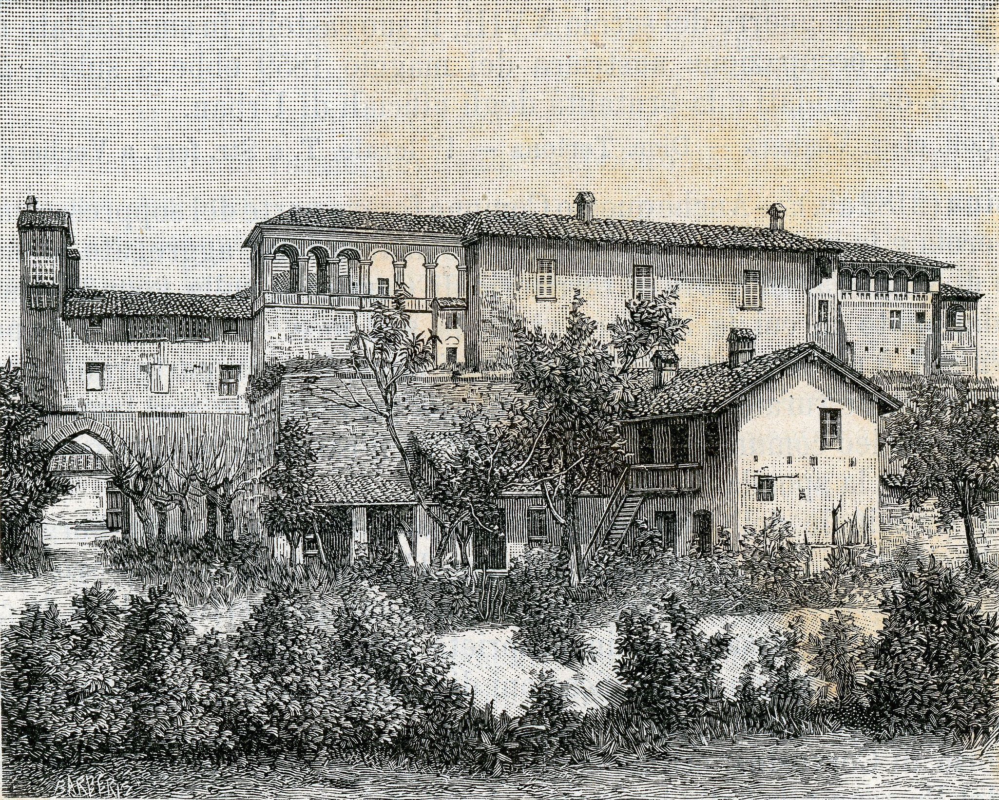 Casei Gerola: castello medioevale (xilografia di Barberis).